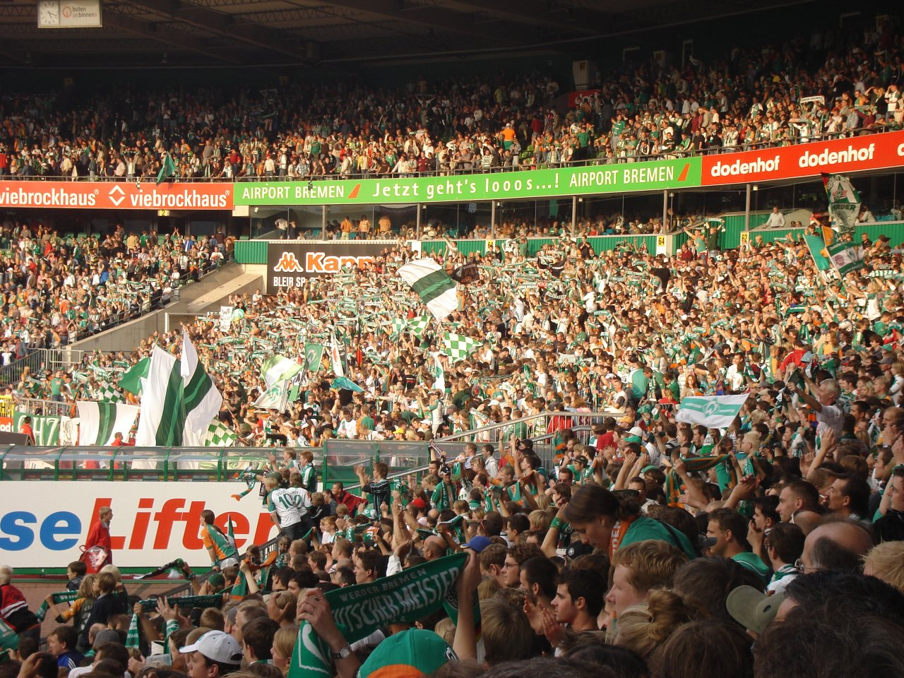 Block 62 Ostkurve im Weserstadion Bremen - Ultras des SV Werder Bremen / fotografiert am 30.09.2006 während der Bundesliga-Partie SV Werder Bremen - Borussia Mönchengladbach / selbst fotografiert von Schlixn